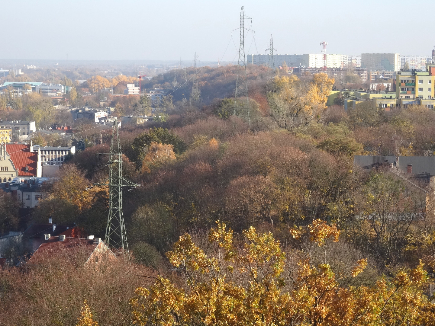 Zbocze Bydgoskie widoczne z galerii widokowej na szczycie wieży ciśnień w Bydgoszczy